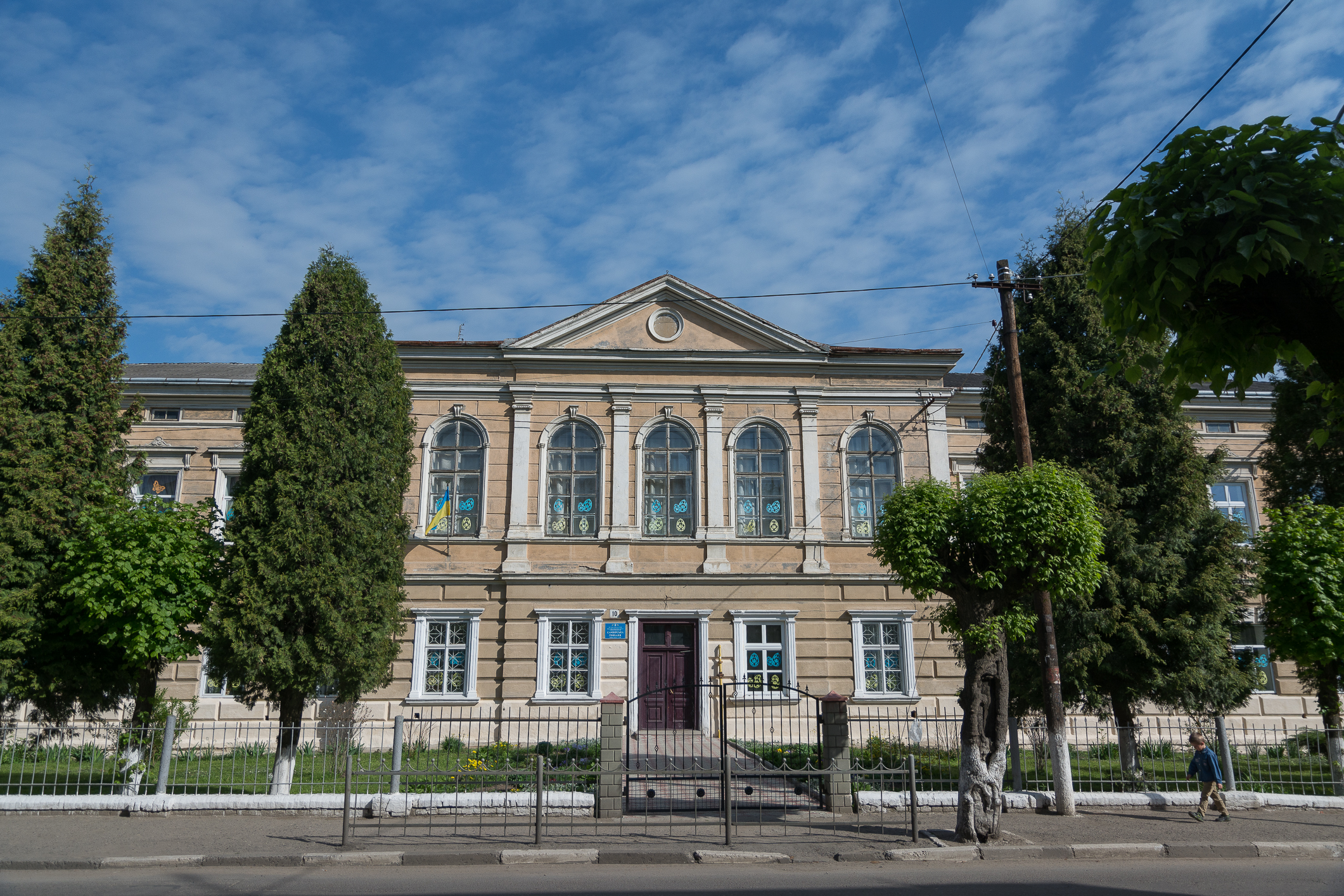 Будинок гімназії (мур.), Самбір, вул. Січових Стрільців, 10